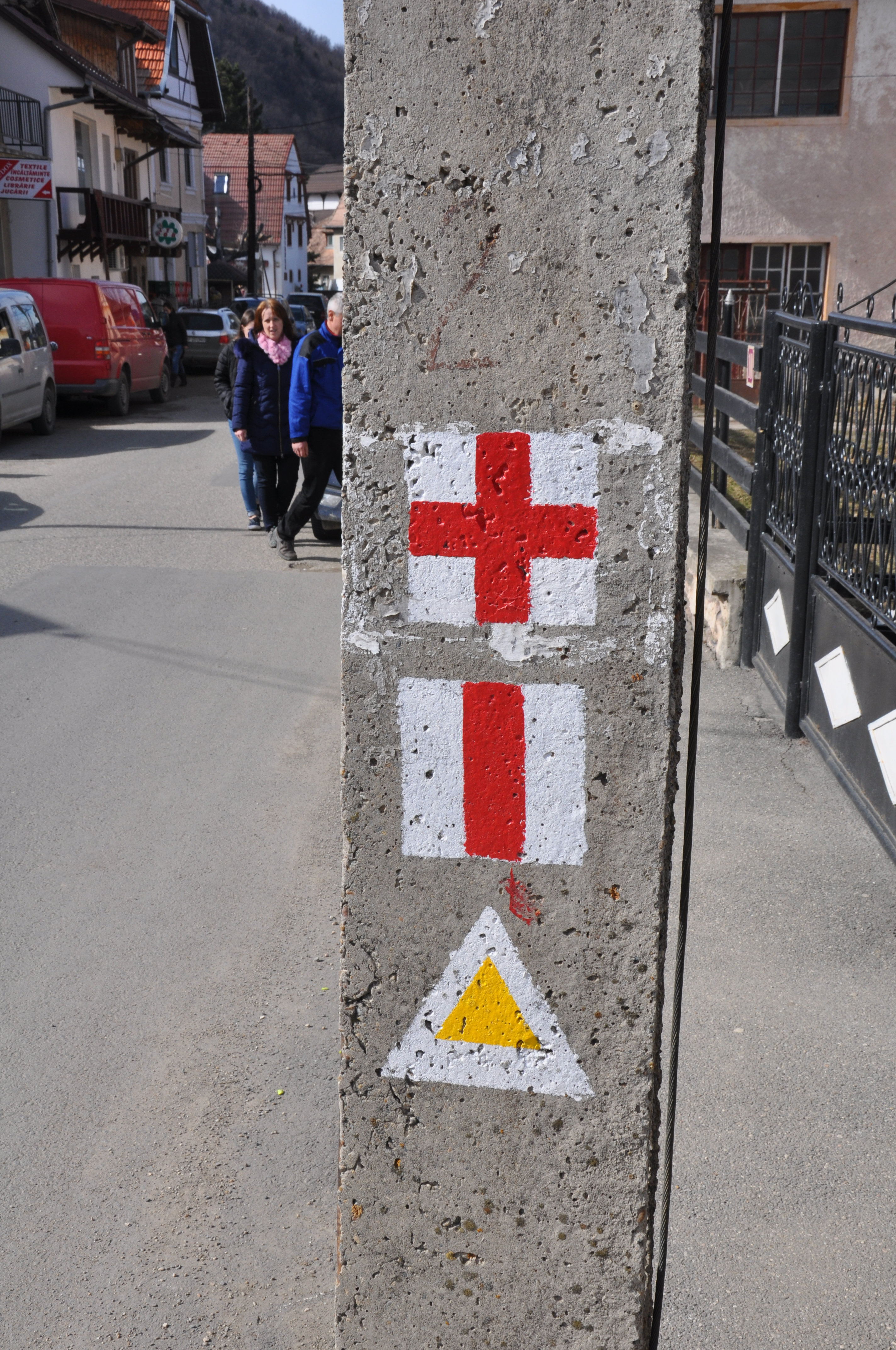 Місто Бран